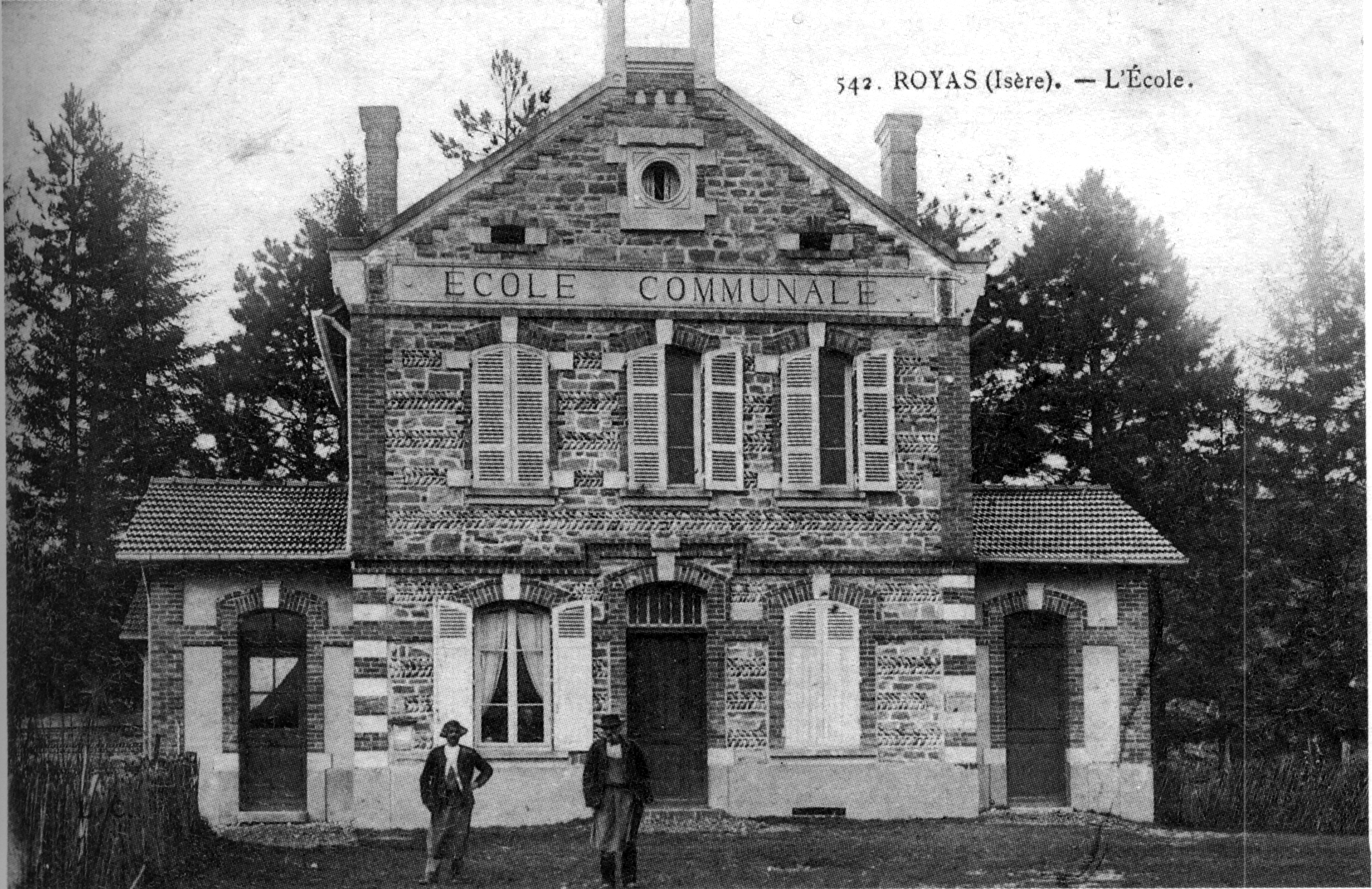 Royas, l'école en 1909